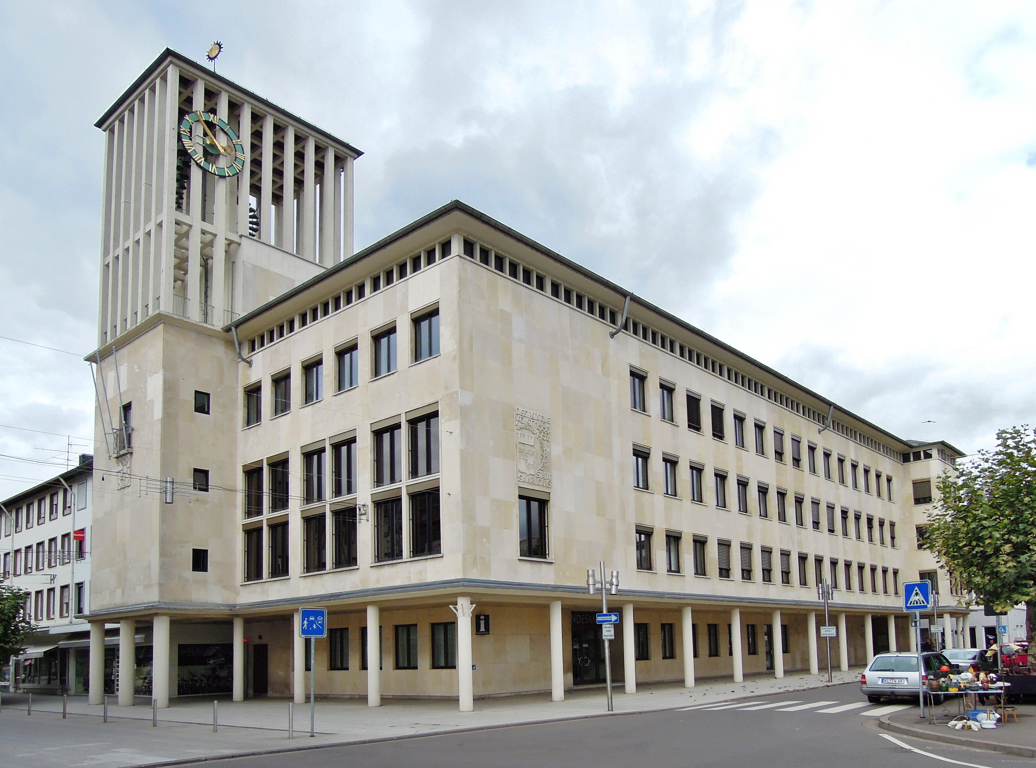 Großer Markt 1, Rathaus, 1951-54 von Peter Focht, integrierter Altbau („Haus Gottschalk“) Ecke Pavillon-/Adlerstraße, 1688 (Einzeldenkmal)